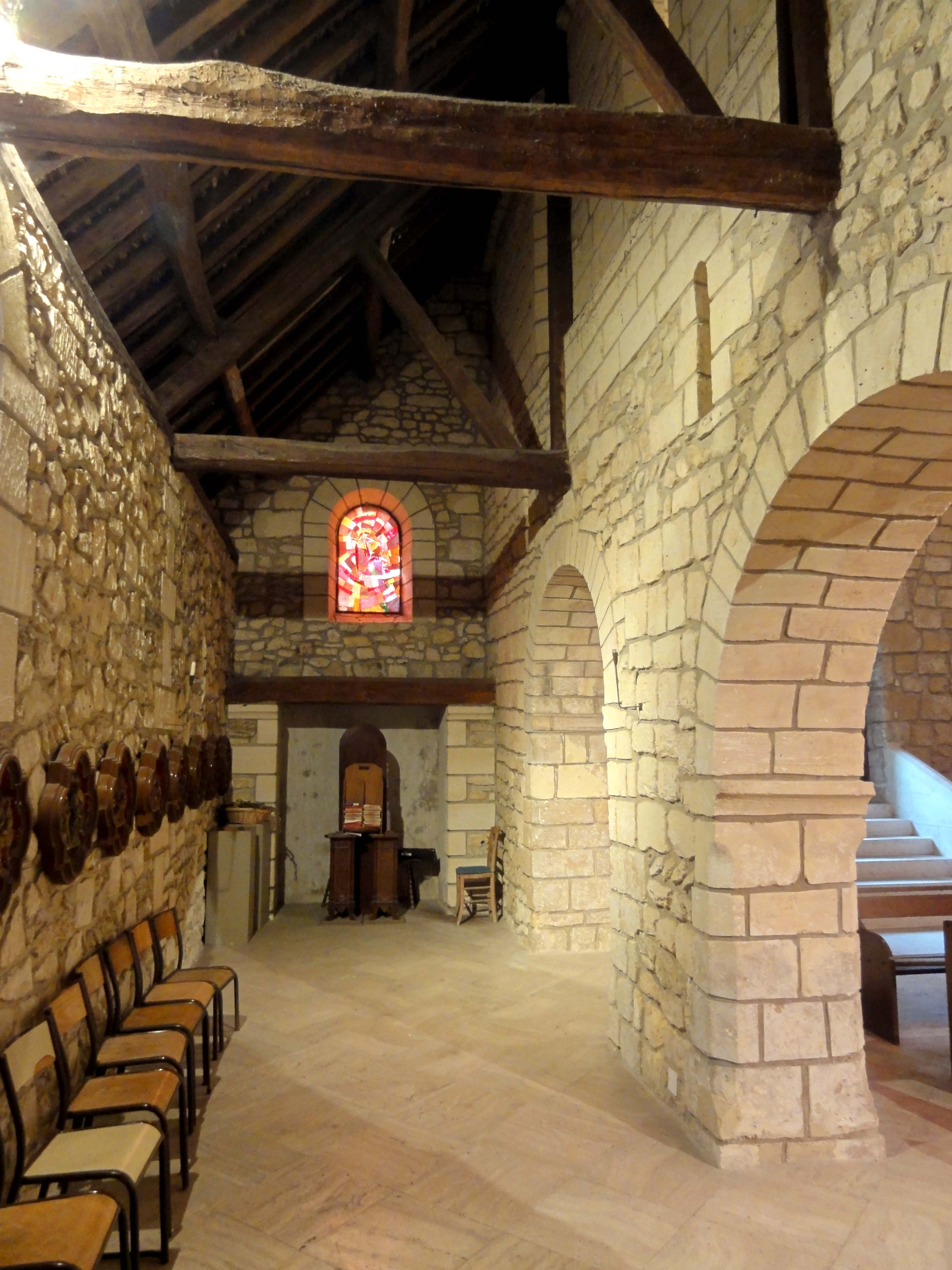 Intérieur de l'église - voir titre.